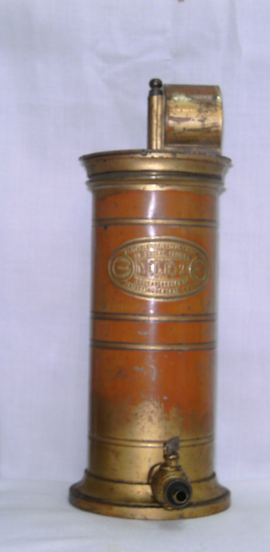 Irrigateur Éguisier.